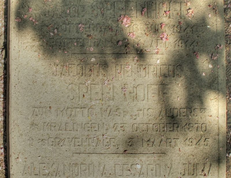 laatste rustplaats opschrift grafsteen van Jacobus Hendrikus (Koos) Speenhoff. Den Haag?